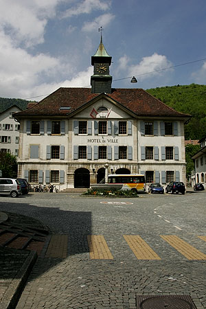 Moutier: Hôtel de ville